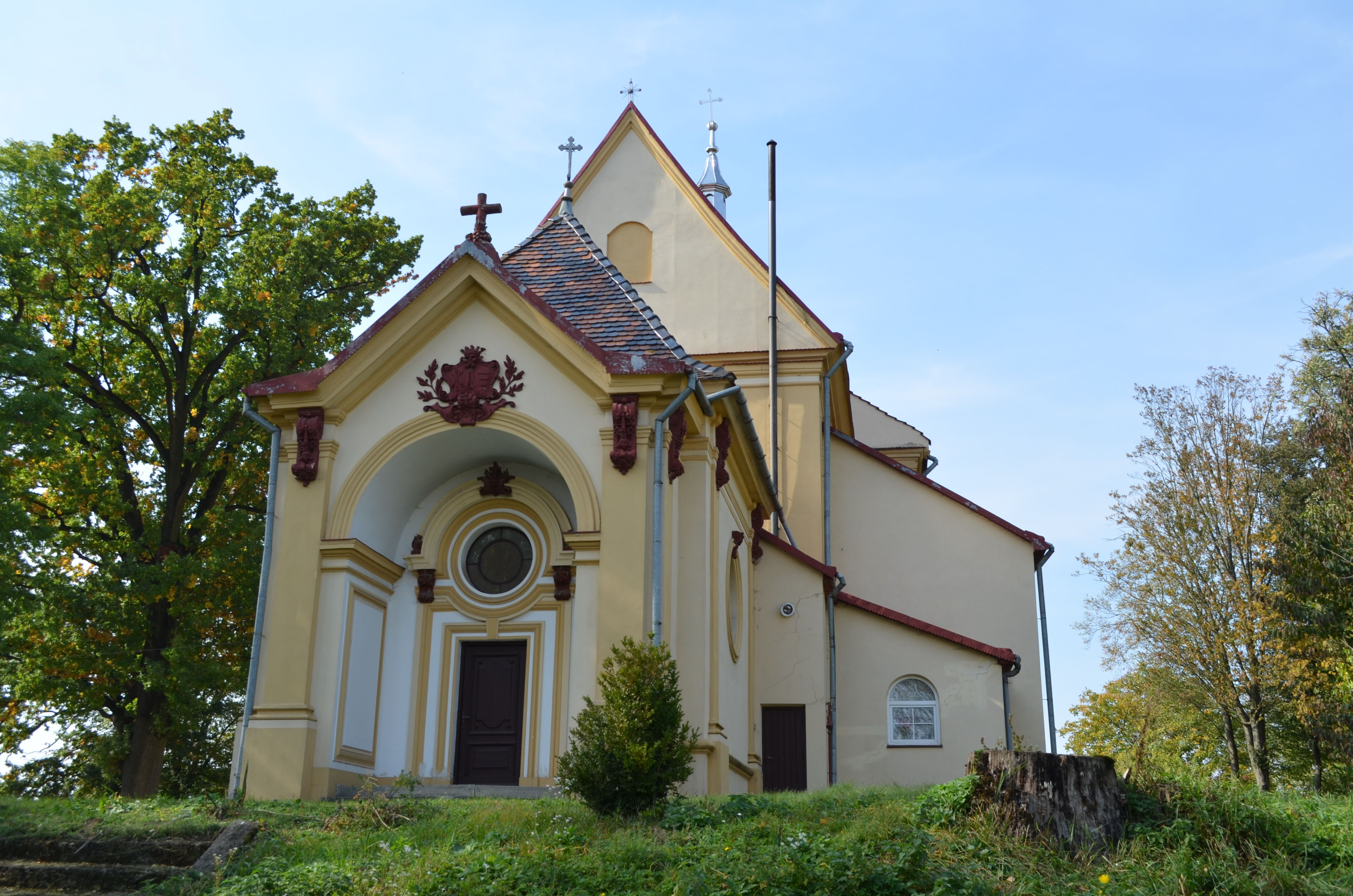 Костел святої Катерини, с.Воютичі